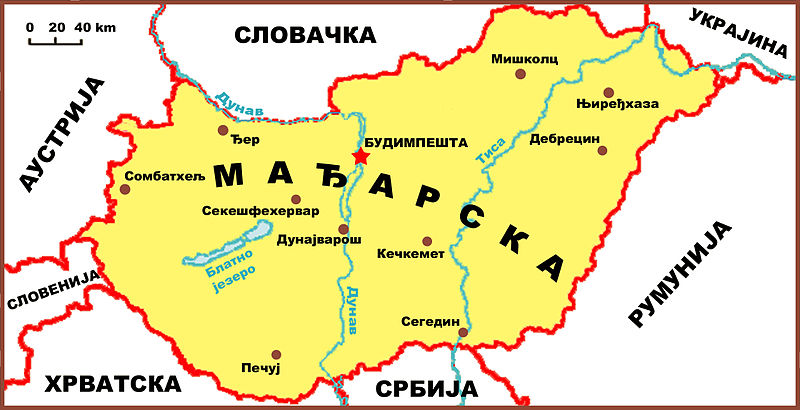 Аутор: Саша Костић Мађарска мапа Licensing